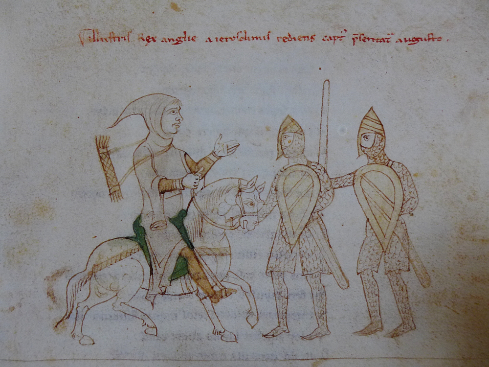 Gefangennahme von Richard Löwenherz Chronik des Petrus de Ebulo 1197, Liber ad honorem Augusti.